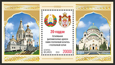 20-годдзе ўсталявання дыпламатычных адносін паміж Рэспублікай Беларусь і Рэспублікай Сербія